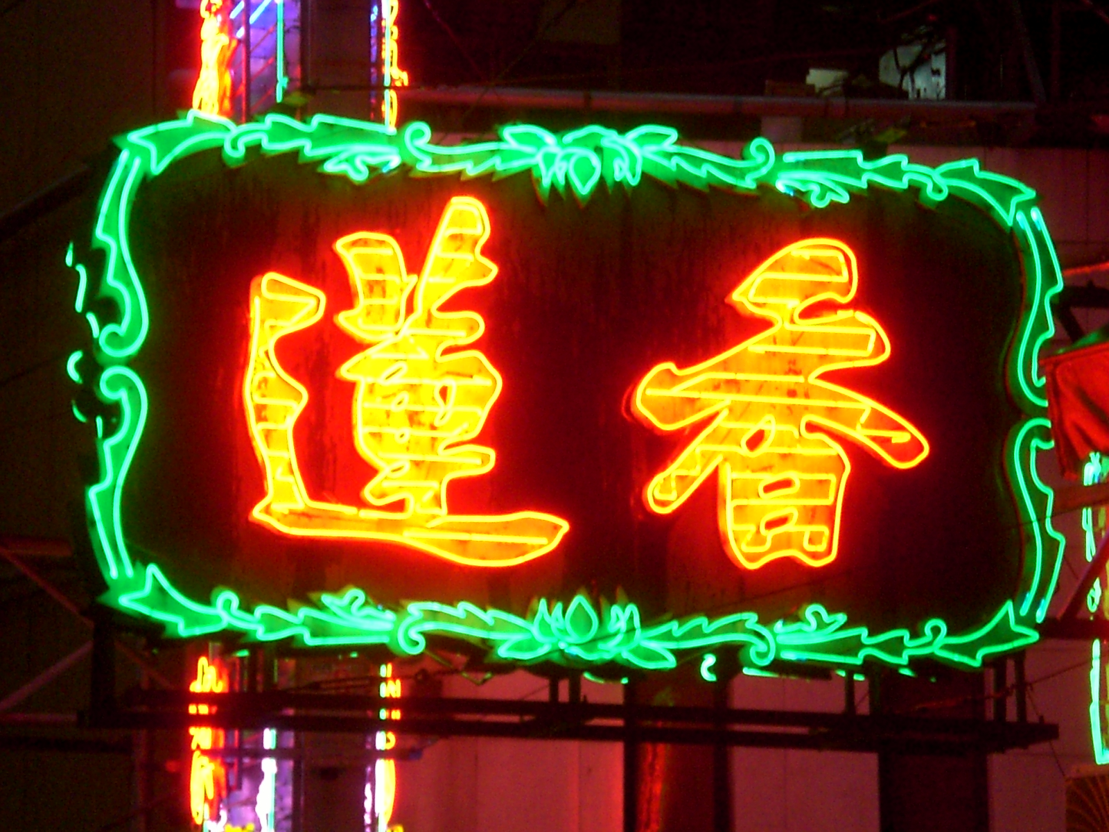 中環蓮香樓, 鴨巴甸街1號